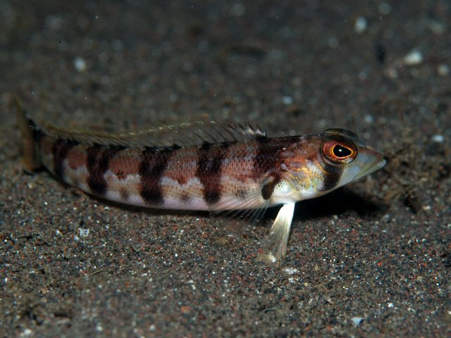 クラカケトラギス Parapercis sexfasciata